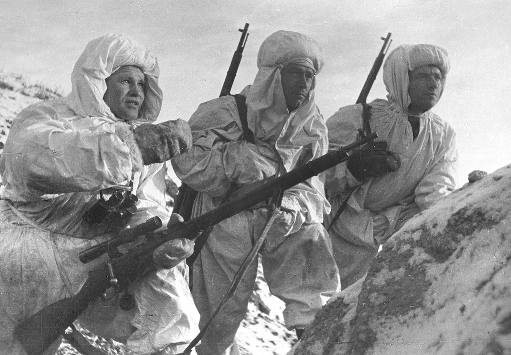 Снайпер Герой Советского Союза Василий Зайцев объясняет новичкам предстоящую задачу